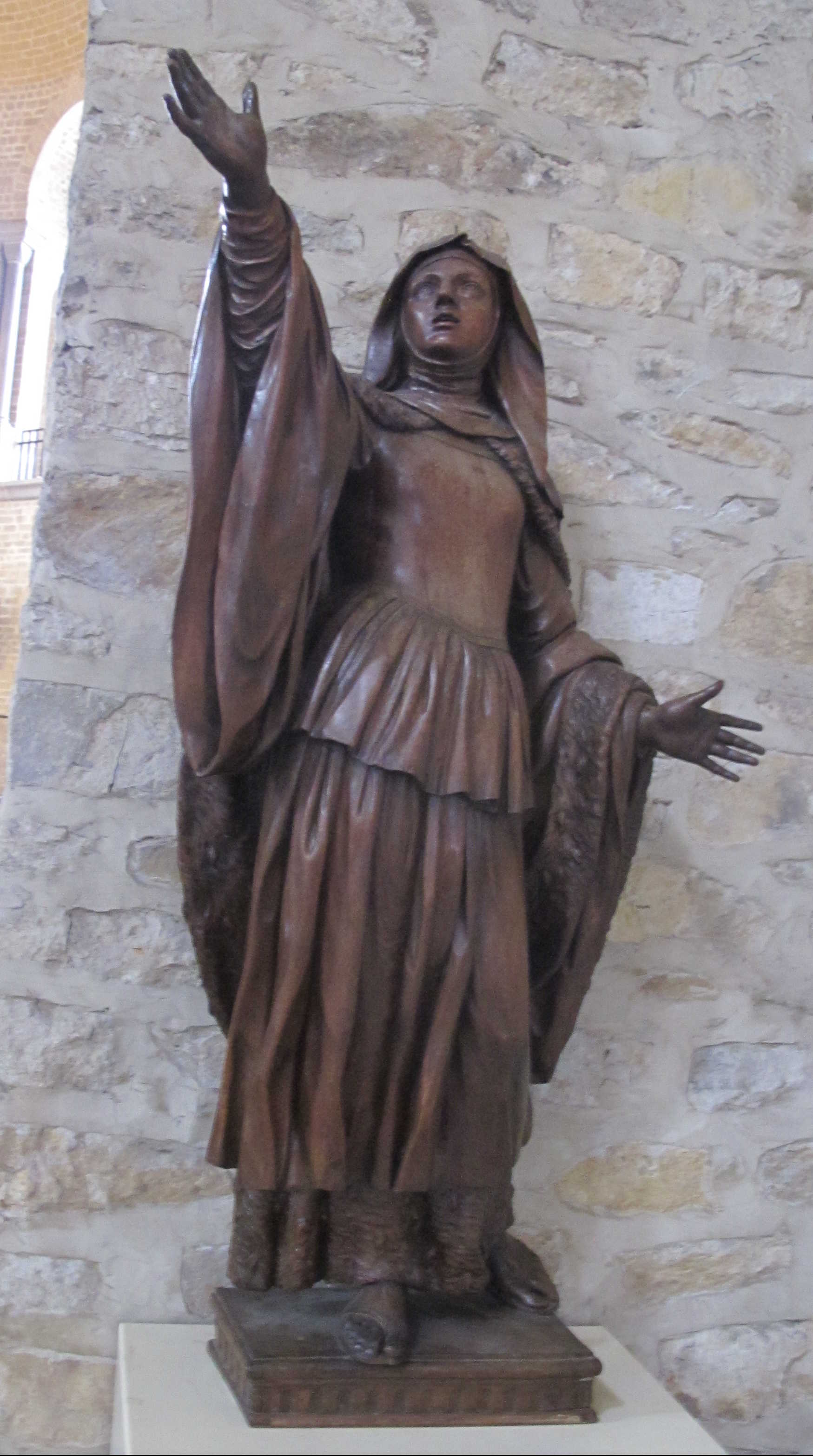 Darstellung der St. Gertrud Äbtissin im Westschiff der Kirche